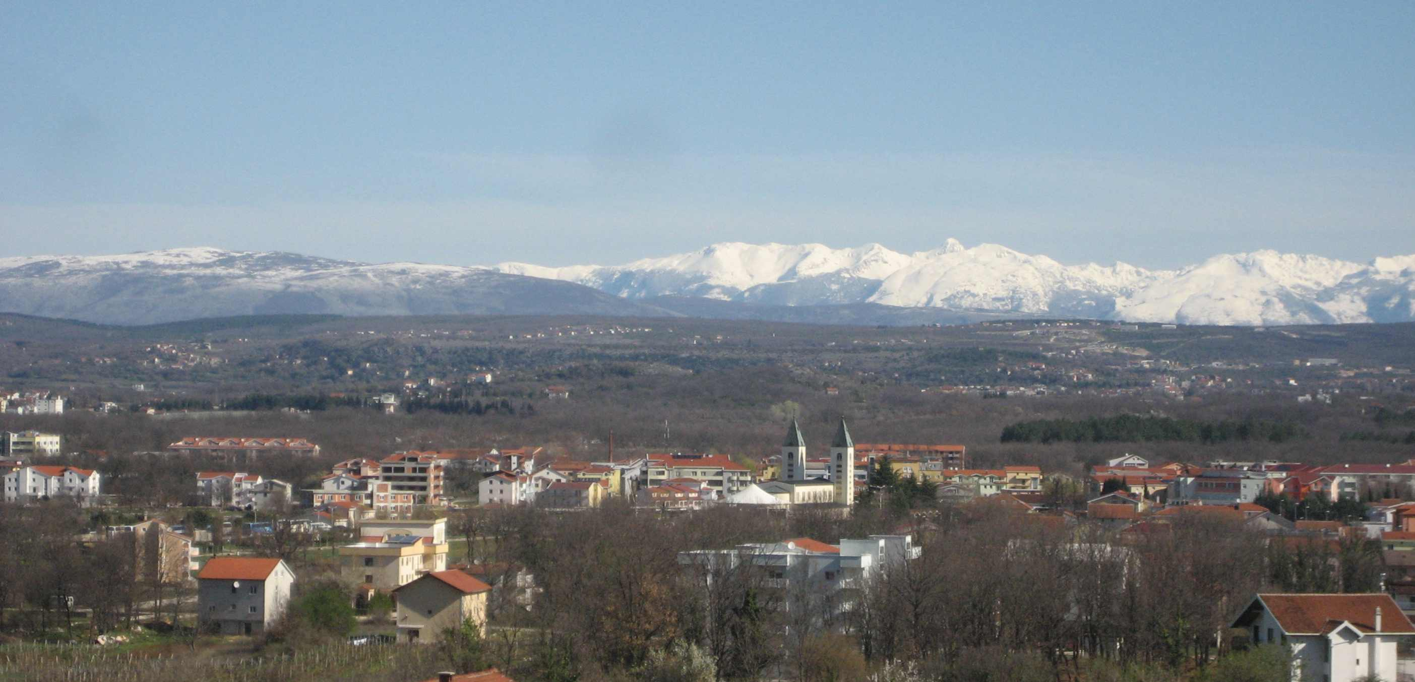 Medjugorje